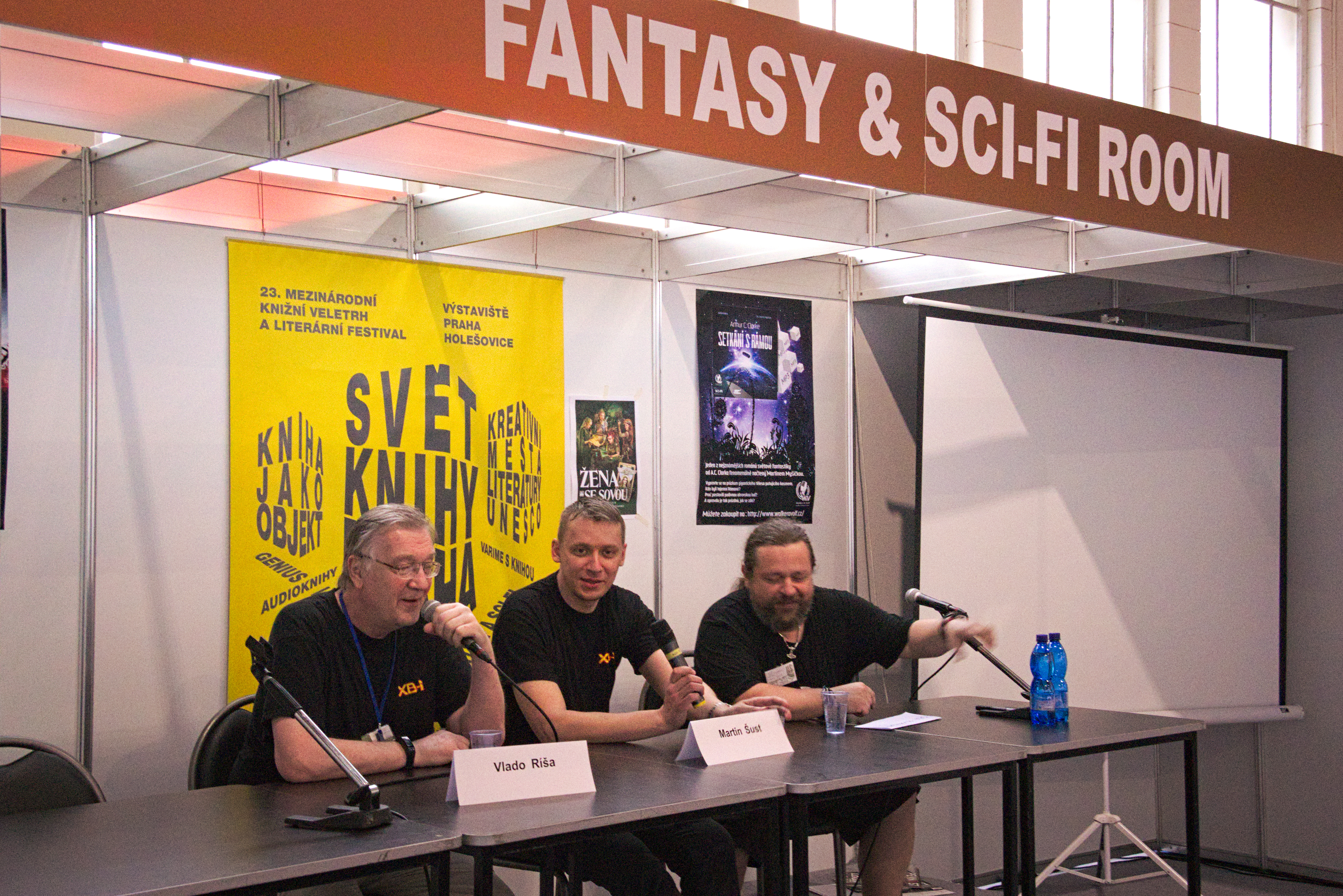 Zleva: Vlado Ríša (šéfredaktor), Martin Šust (editor), Saša Rusevský (vydavatel) na veletrhu Svět Knihy 2017, Výstaviště Holešovice, Praha